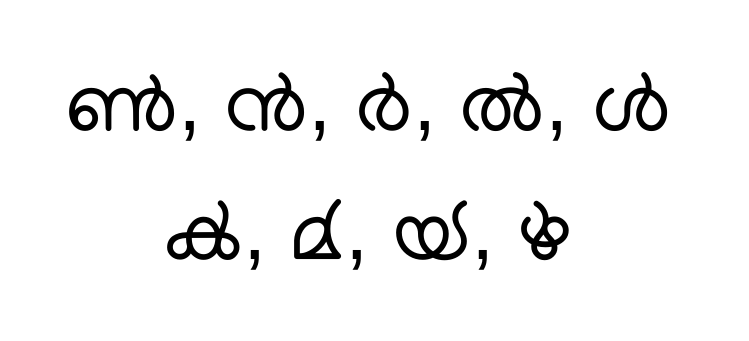 മലയാളം ചില്ലക്ഷരങ്ങൾ